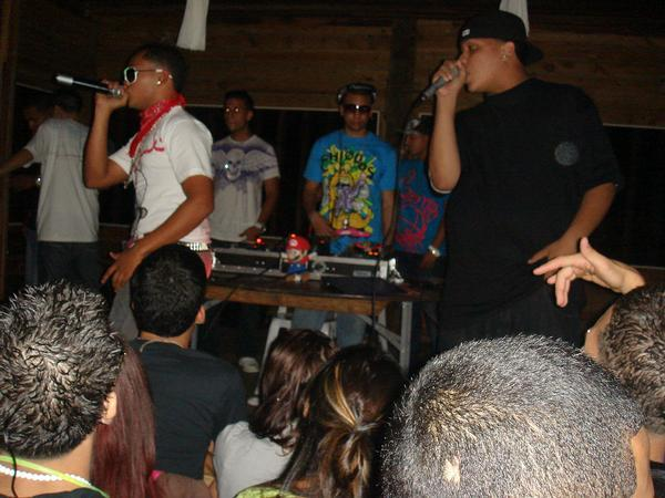 Belto (Izquierda) & Darell (Derecha) En Vivo (2010)